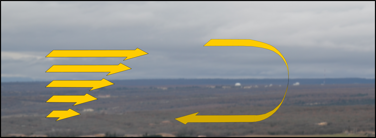 Cisailhament dei vents e mesa en rotation a l'entorn d'un aisse orizontau.